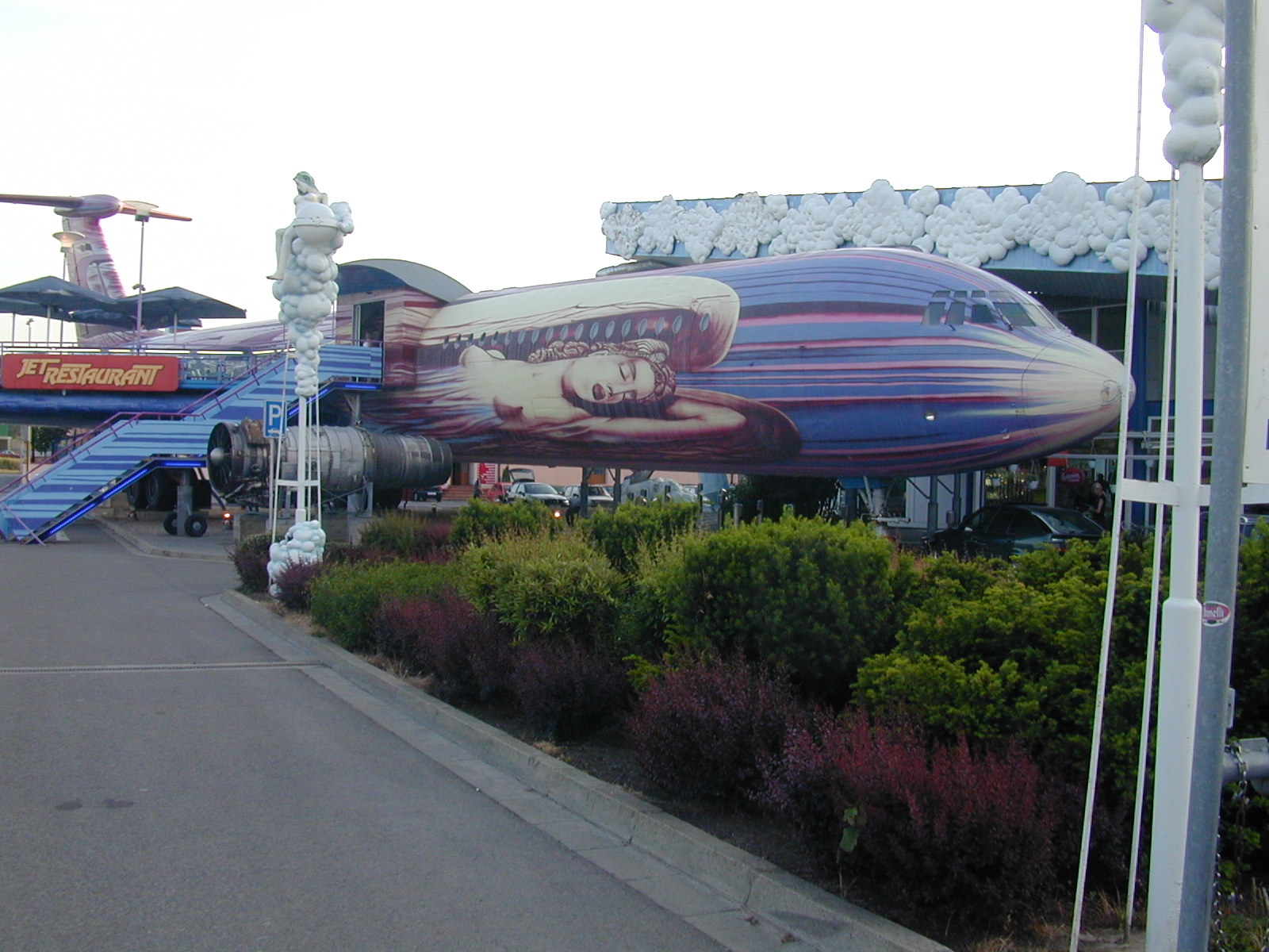 excalibu city